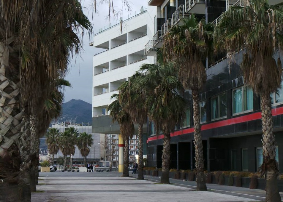 Grand Hotel Salerno